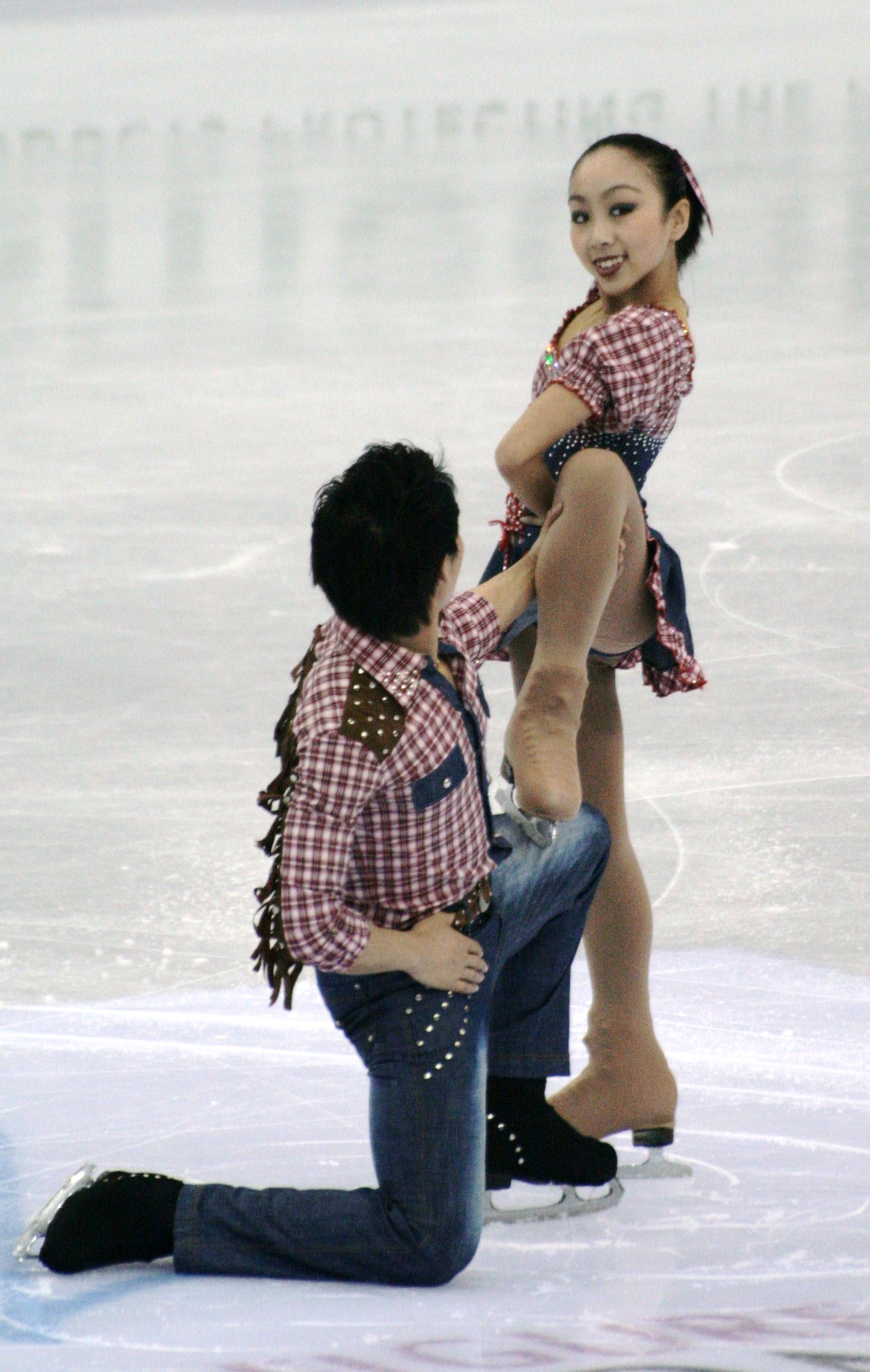 Суй Вэньцзин и Хань Цун (КНР) на чемпионате мира по фигурному катанию 2012